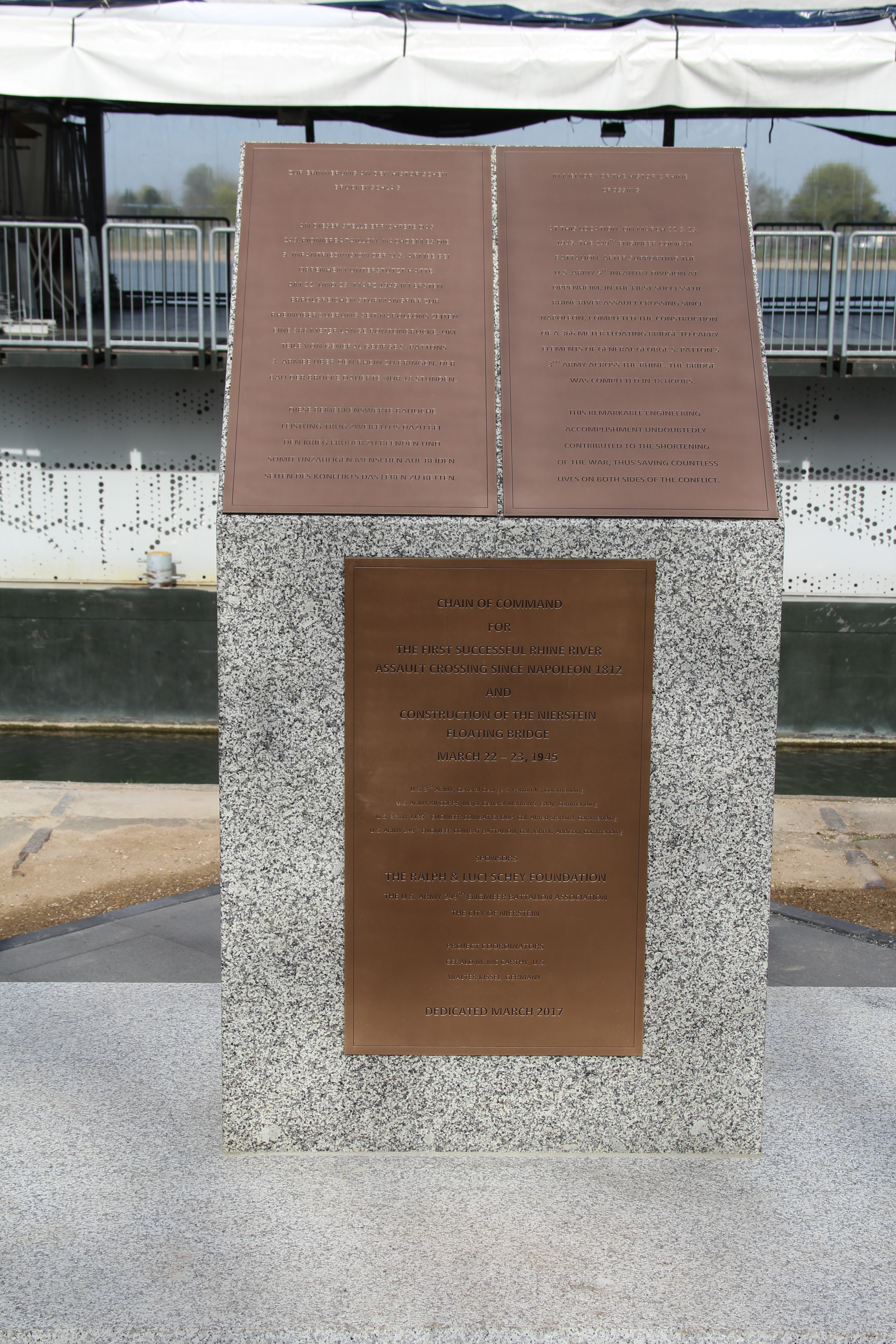 Denkmal zum Anlass der Überquerung des Rheins am Ende des zweiten Weltkriegs durch amerikanische Truppen. Text auf der linken Tafel: Zur Erinnerung an den historischen Brückenschlag / An dieser Stelle errichtete das 249. Pionierbataillion, nachdem es die 5. Infanteriedivision der U.S. Armee bei Oppenheim unterstützt hatte, am 22. und 23. März 1945 im ersten erfolgreichen Sturmangriff zur Rheinüberquerung seit Napoleons Zeiten eine 366 Meter lange Pontonbrücke, um Teile von General George S. Patrons 3. Armee über den Rhein zu bringen. Der Bau der Brücke dauerte nur 18 Stunden. / Diese Bemerkenswerte bauliche Leistung trug zweifellos dazu bei, den Krieg früher zu beenden und somit unzähligen Menschen auf beiden Seiten des Konflikts das Leben zu retten.